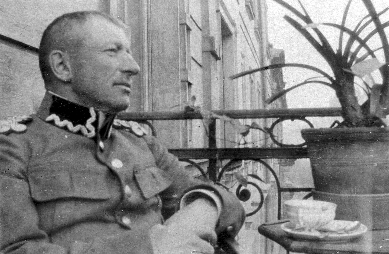 Generał Franciszek Ksawery Latinik w stroju wyjściowym, balkon mieszkania przy ul. Studenckiej 2.